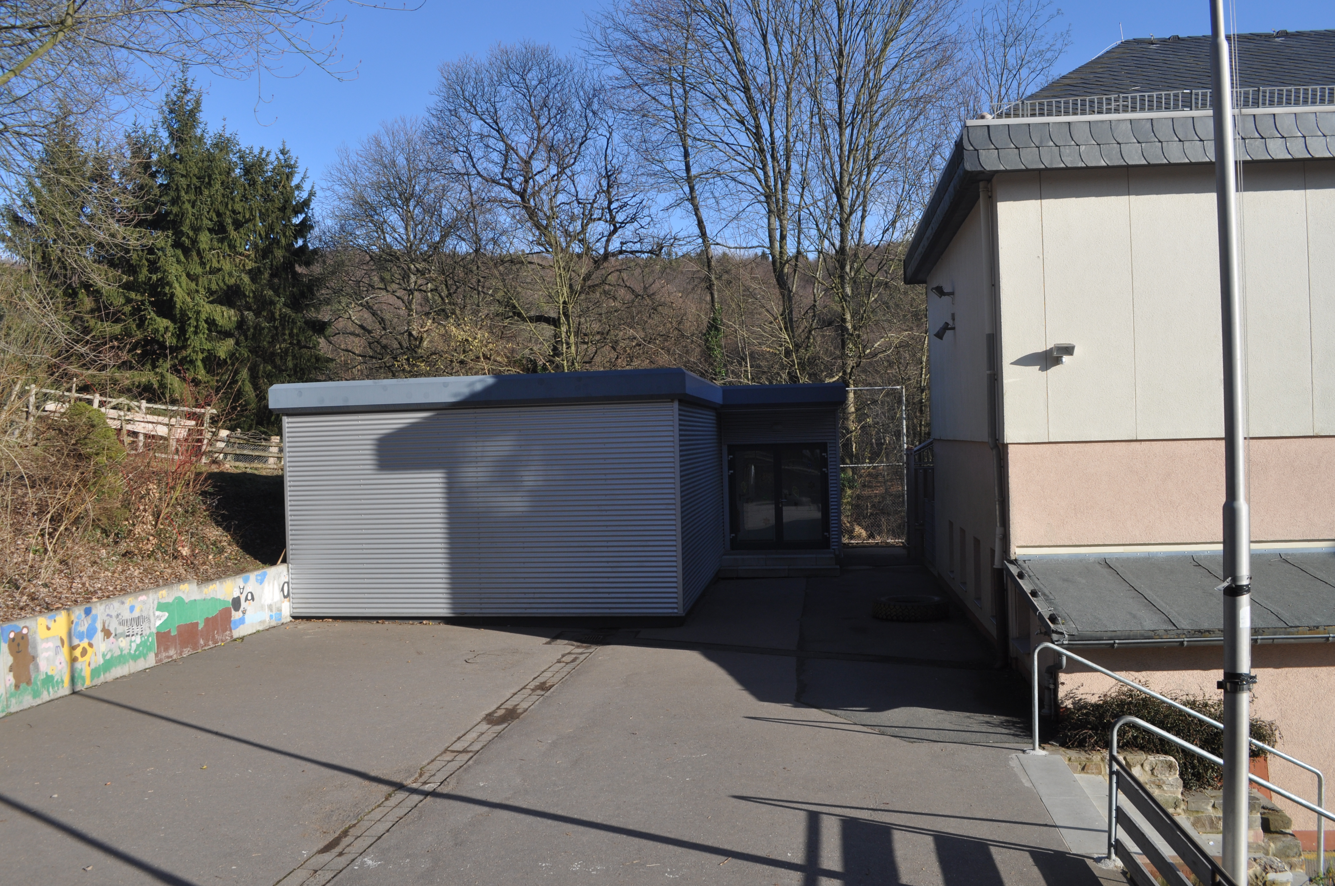 Schule Altenhain, Pavillon